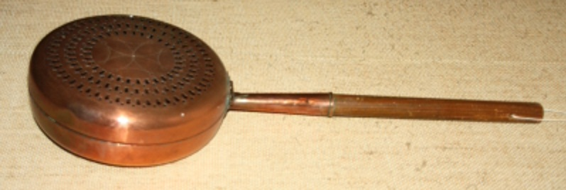 Chaufferette en cuivre